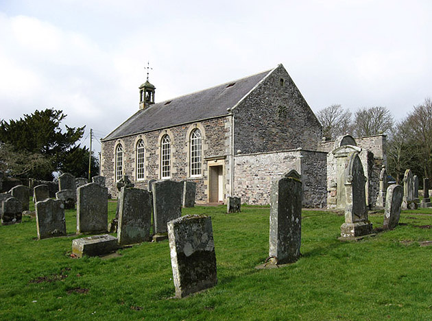 Stichill Kirk